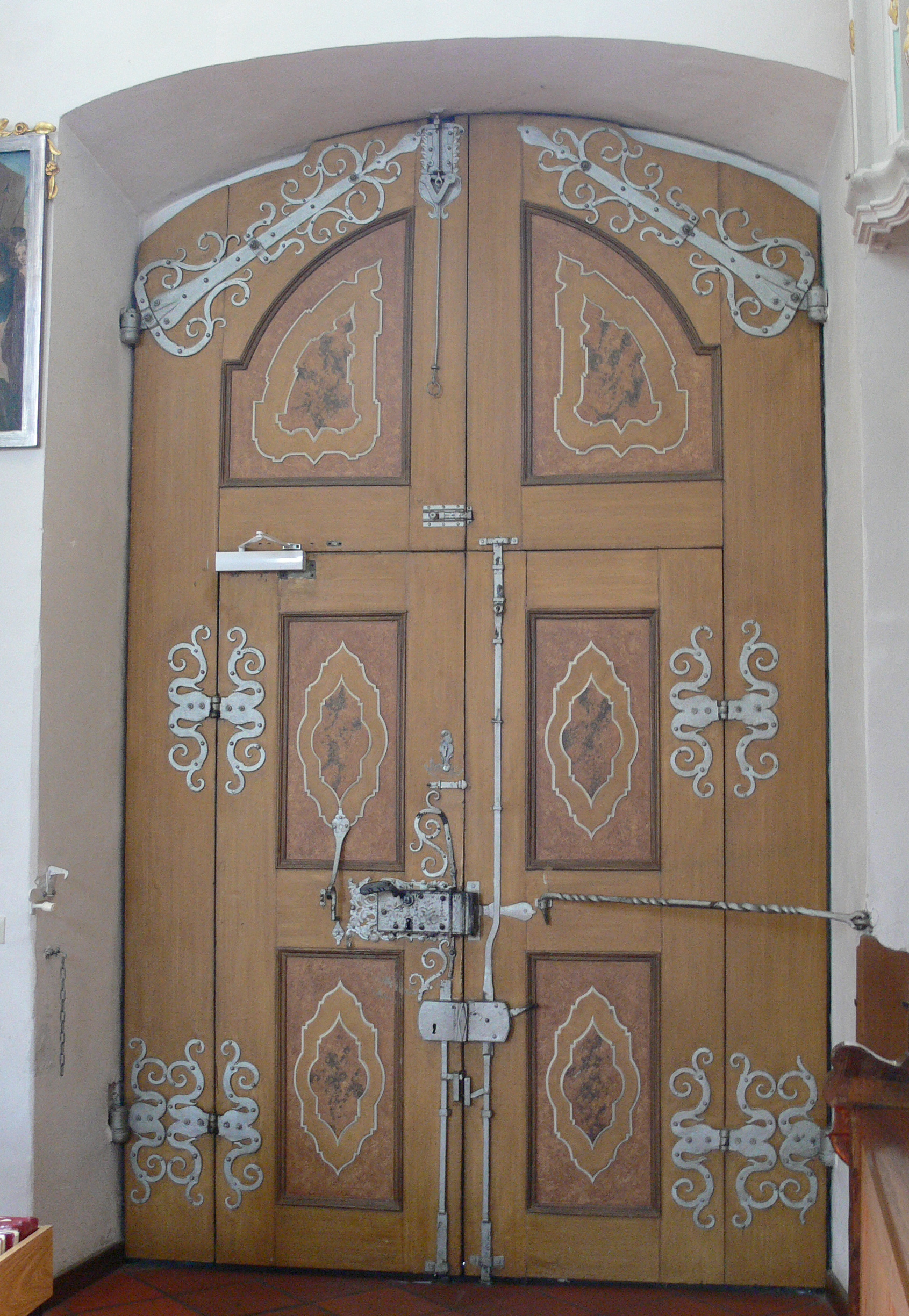 Tür der Pfarrkirche St. Gallus und Ulrich Kißlegg, Landkreis Ravensburg, Baden-Württemberg, Deutschland